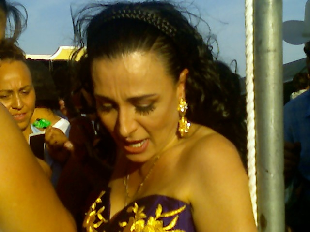 Beatriz Adriana en Arizona